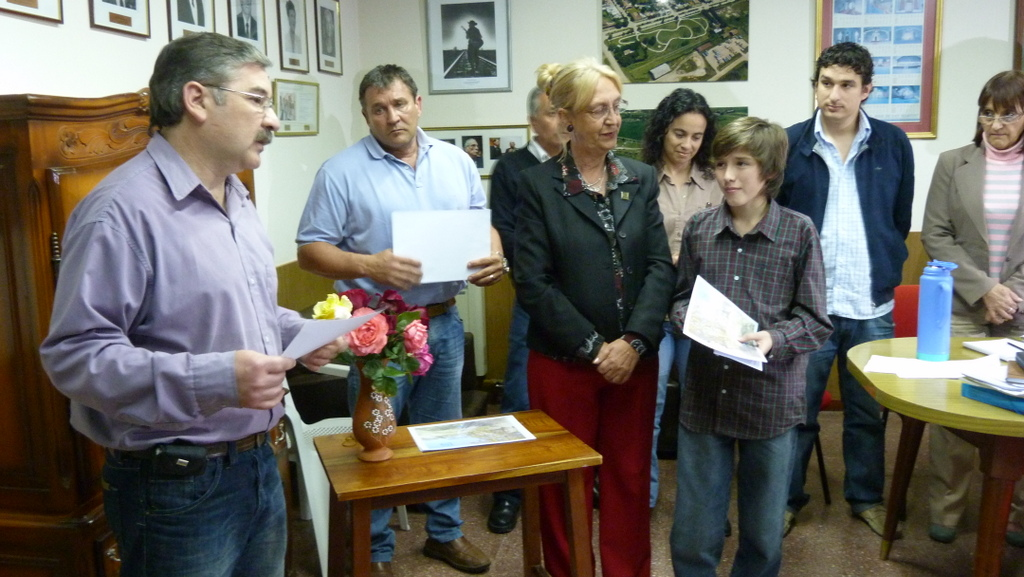 Entrega de los reconocimiento y premios a los Ganadores del Concurso promocionado desde el municipio para la Creación de una Bandera para General Galarza, del que resulto electo el trabajo presentado por el Sr. Fracaroli Luis y su Hijo Giovanni bajo el seudónimo C.A.B.J.R.